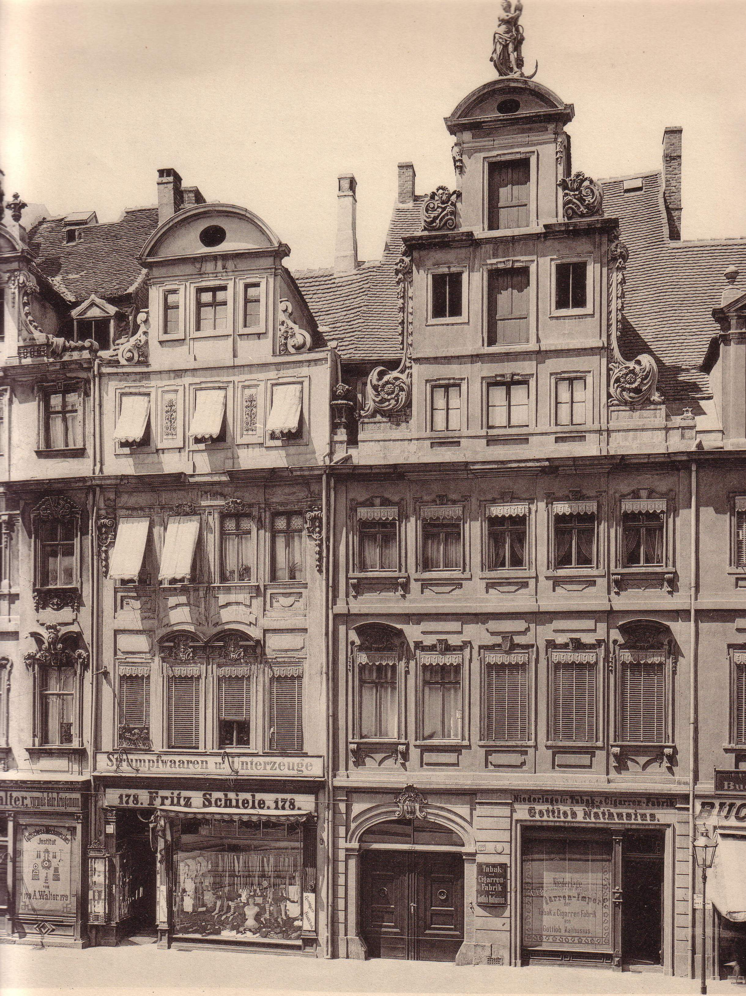 Wohnhäuser am Breiteweg 177 und 178 in Magdeburg (Deutschland), erbaut um 1720, aus: Blätter für Architektur und Kunsthandwerk, XVI Jahrgang, Tafel 119, Verlag von Max Spielmeyer, Berlin